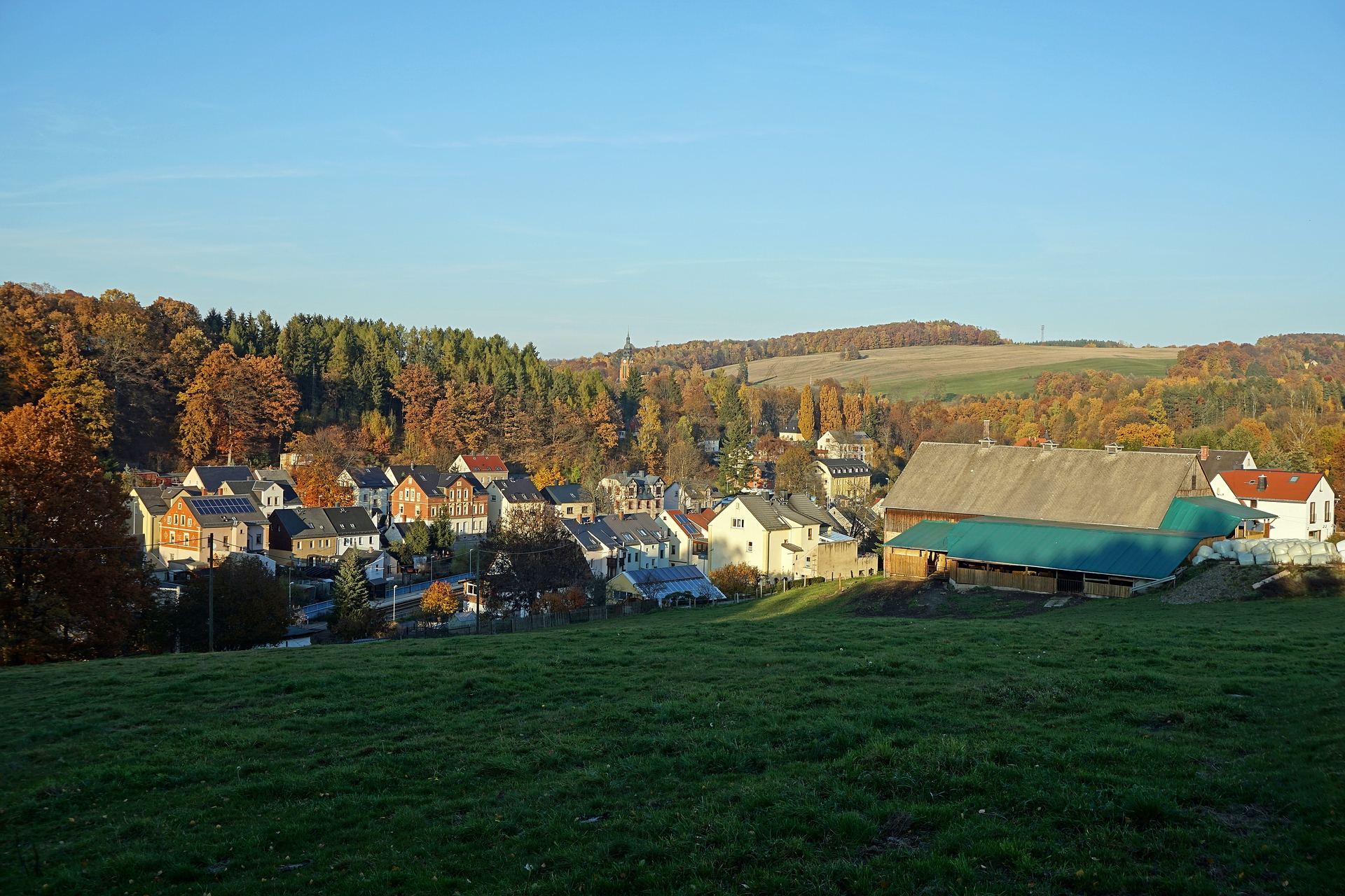 Blick in den Chemnitzer Stadtteil Harthau, 2015